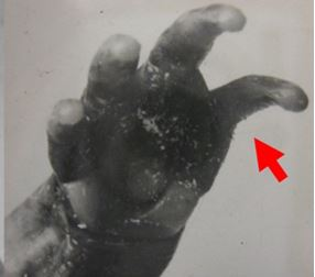 Tento obrázek je převzat z Tento obrázek je tam zobrazen, ale není uložen v commons. Je z něj vytažen a zvětšen podstatný detail.